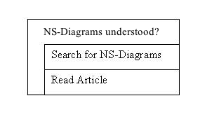 Nassi-Shneiderman diagram